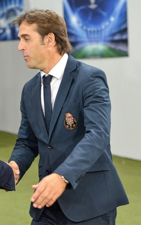 Тренер Хулен Лопетегі під час роботи з ФК Порту